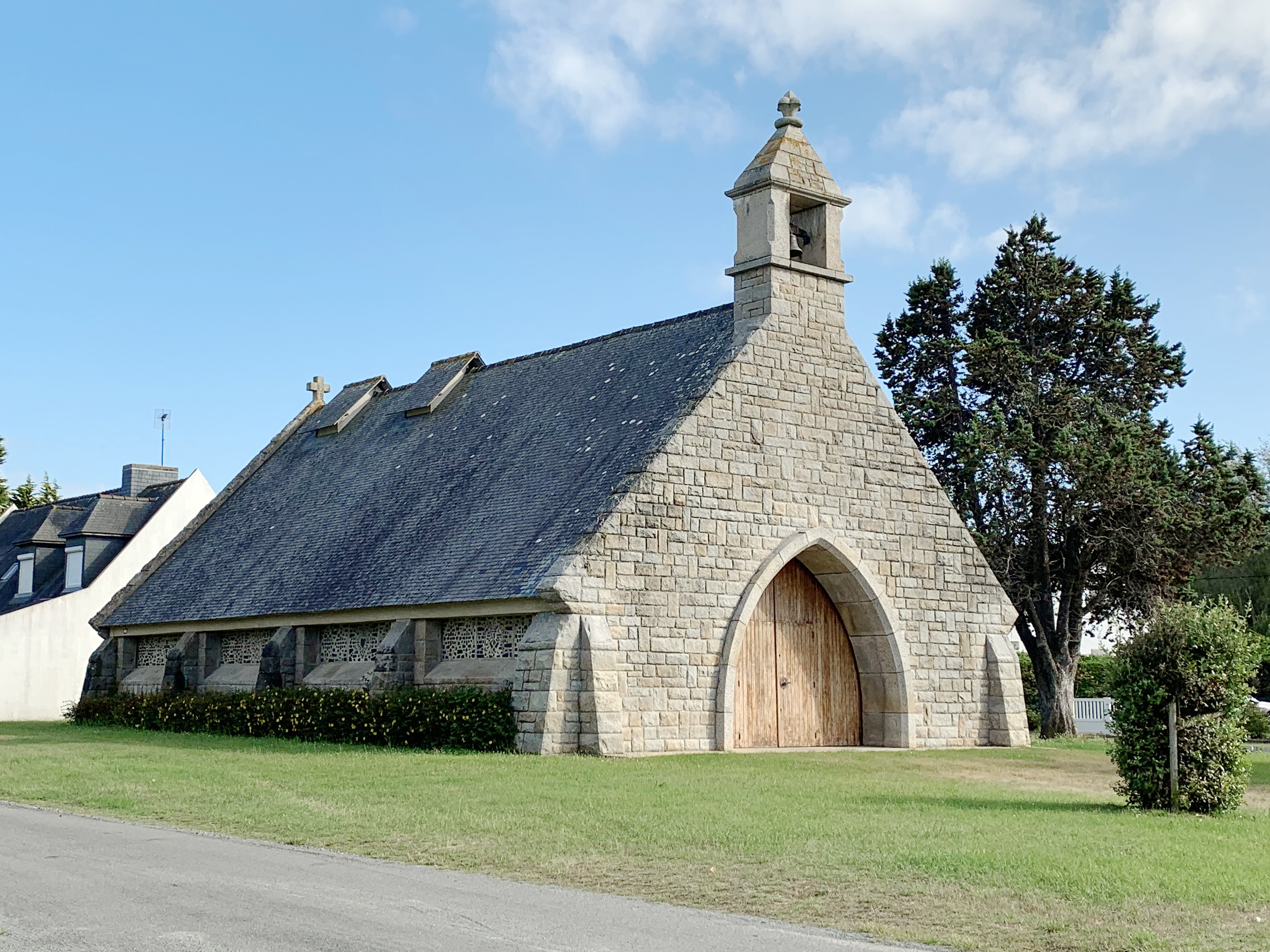 La Chapelle Notre-Dame des Victoires à Saint-Cast-le-Guildo au lieu-dit Les Mielles, dans les Côtes d’Armor. Elle a été construite au milieu du XXe siècle par la famille Nicolardot, en moellon de granit avec une couverture d’ardoise.